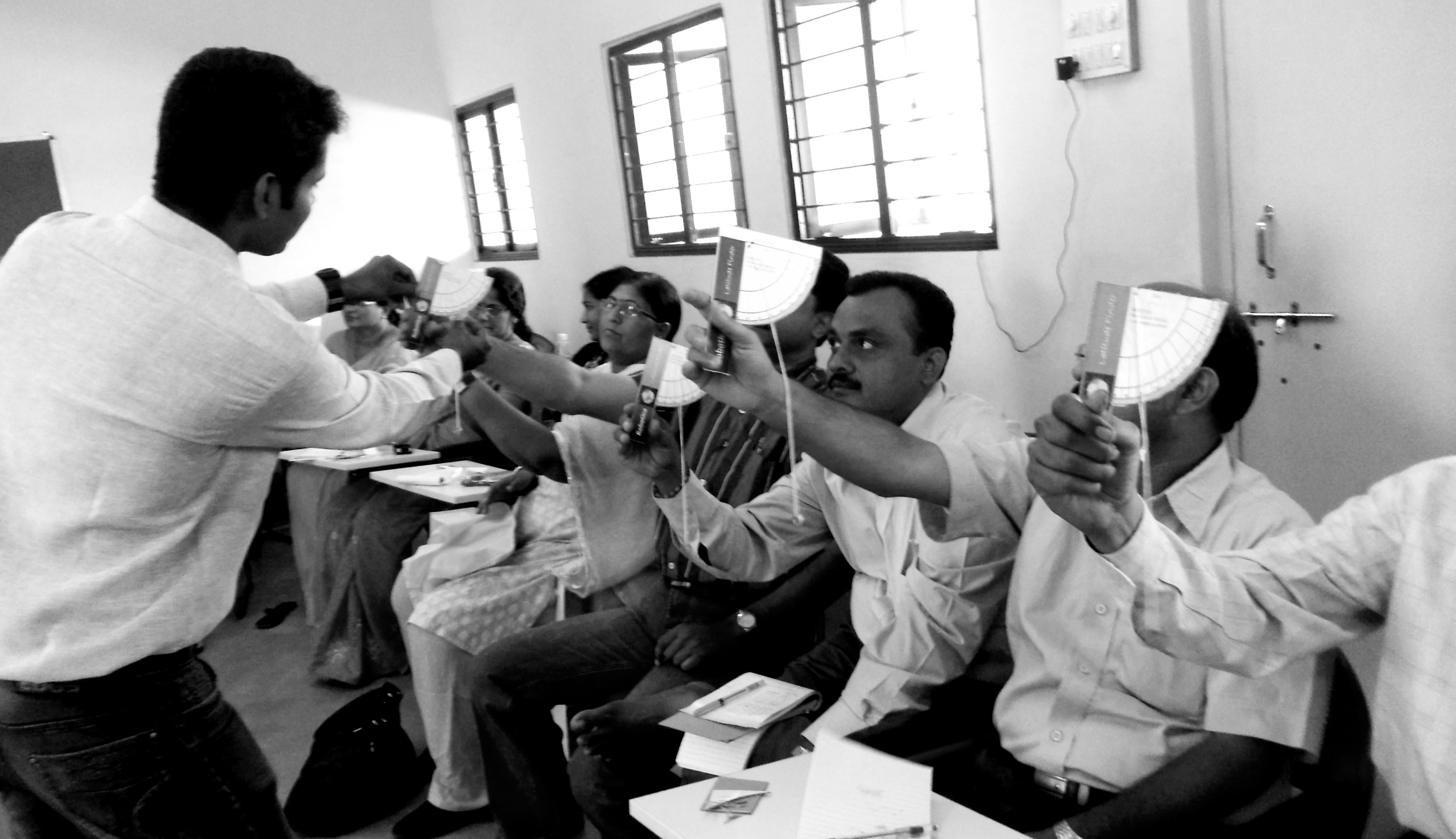 शिक्षकांसाठी प्रशिक्षण